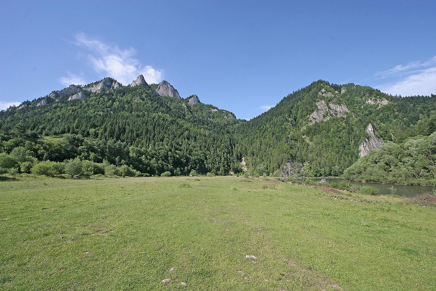 Trzy Korony wiew from Dunajec